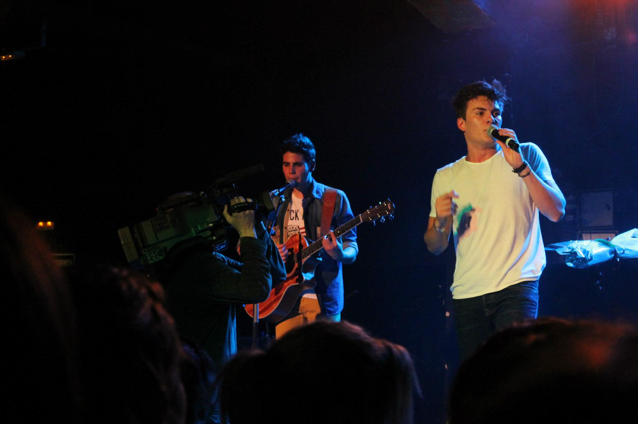 Concierto Sala CATS de Madrid